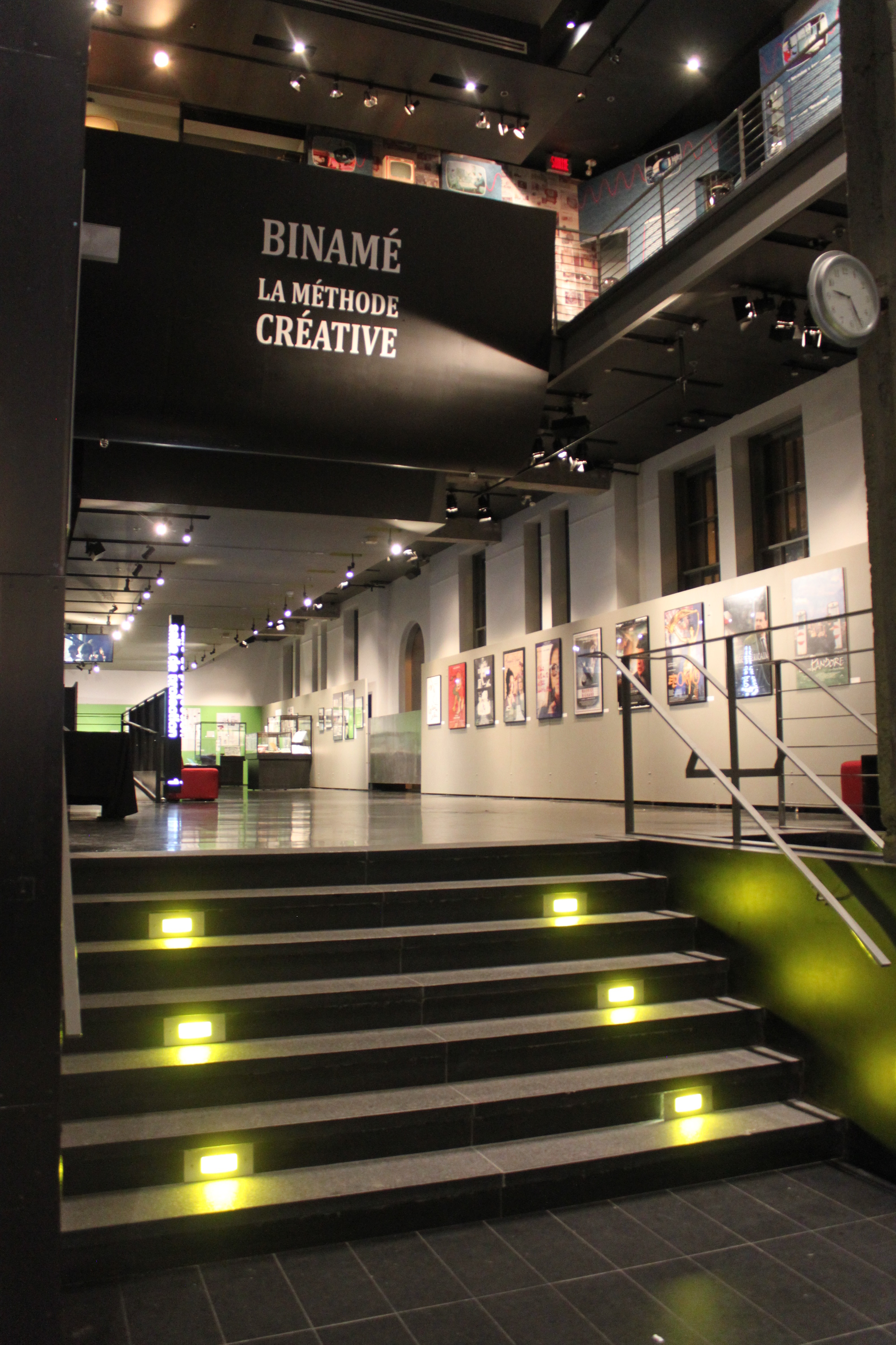 Foyer Luce-Guilbeault de la Cinémathèque québécoise, vu depuis l'entrée